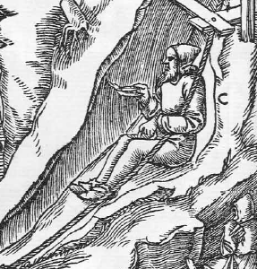 Bergmann, der auf dem Leder einfährt (Teilbild aus "Die verschiedenen Arten der Fahrung")